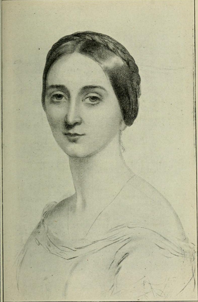 Eugénie Doche, née Marie-Charlotte-Eugénie de Plunkett, née à Bruxelles le 19 novembre 1821 et morte à Paris le 13 juillet 1900, est une comédienne belge. Alexandre Dumas fils lui offre le rôle de sa carrière : celui de Marguerite Gautier dans La Dame aux camélias, créée le 2 février 1852 au Vaudeville. Elle la jouera plus de 500 fois jusqu'en 1867. Cette reproduction parue en 1922 date des années 1840/1850